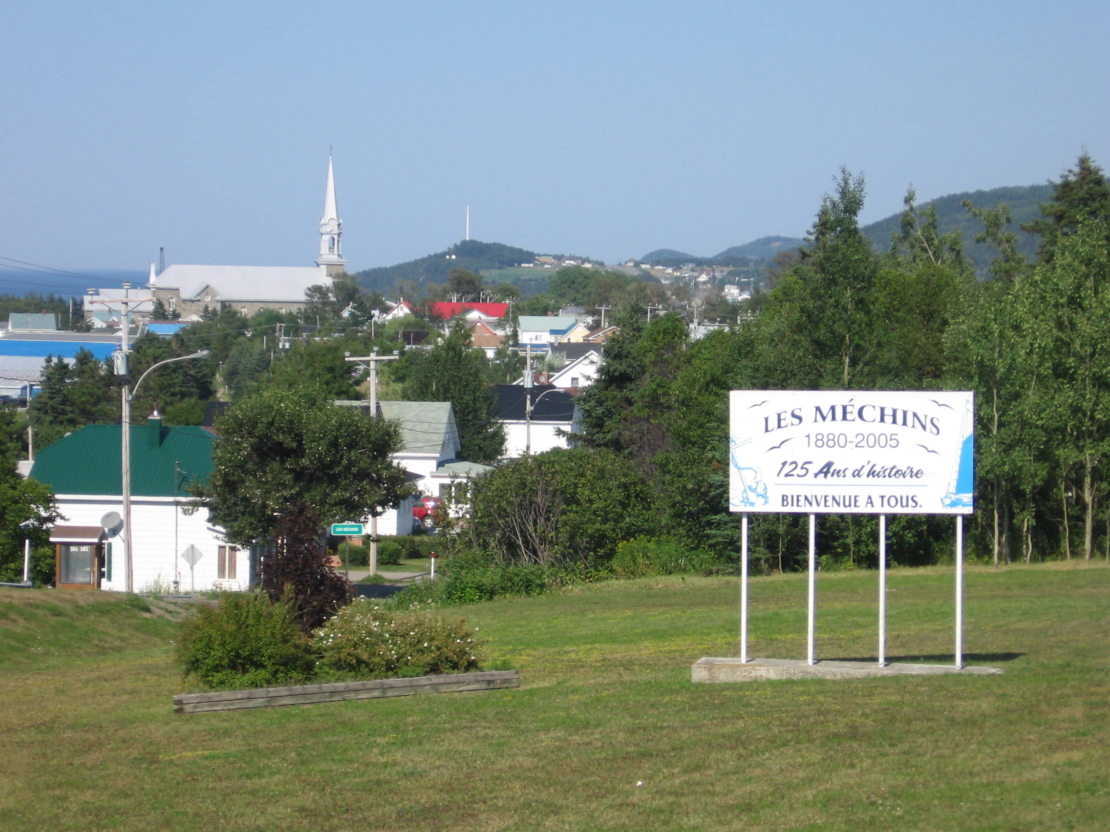 Village Les Méchins